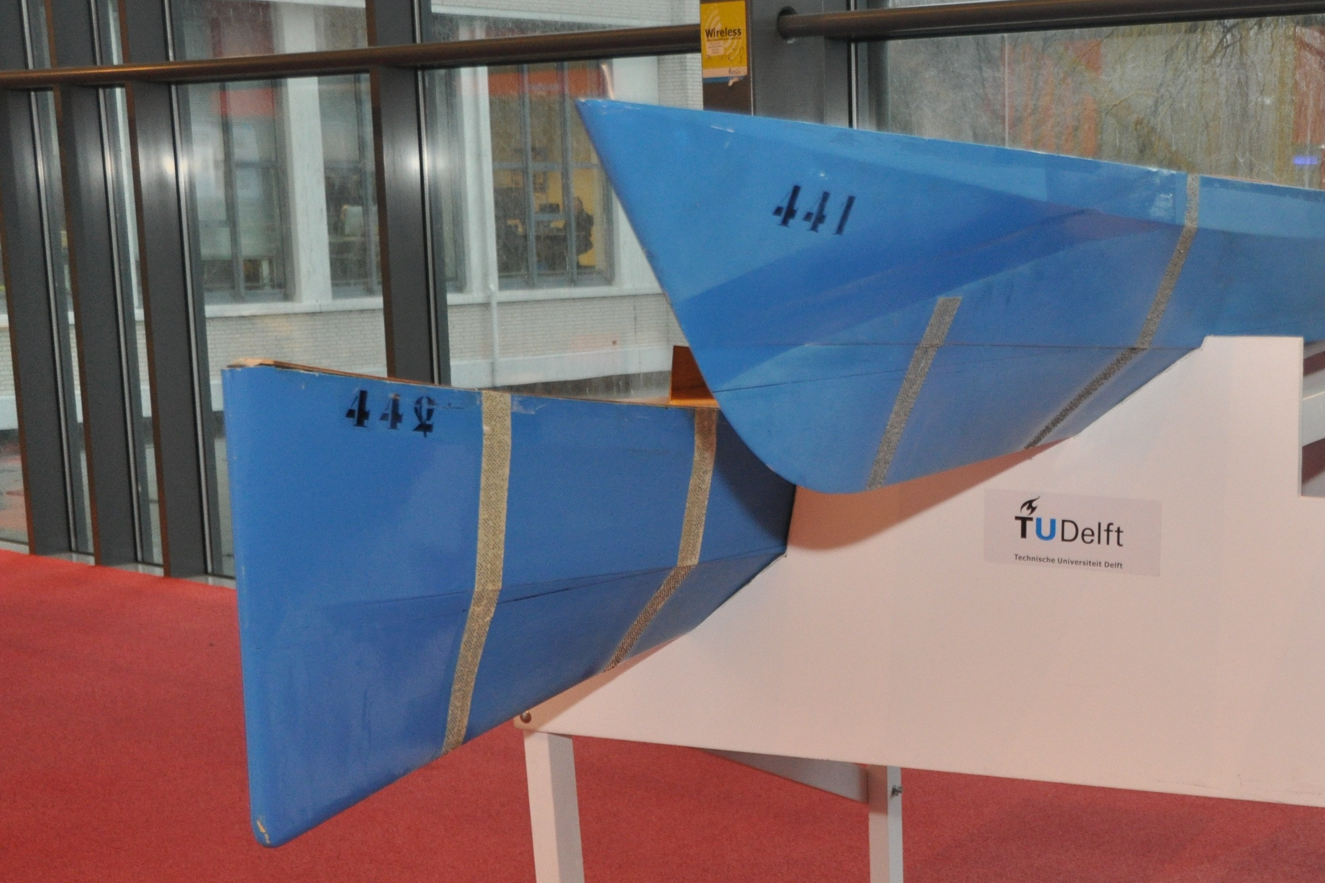 Sleeptankmodellen voor de conventionele boeg en de bijlboeg